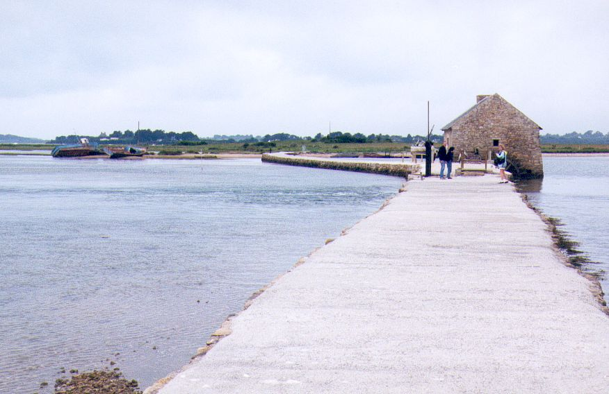 Moulin à marée de l'Île d'Arz avec sa digue de retenue